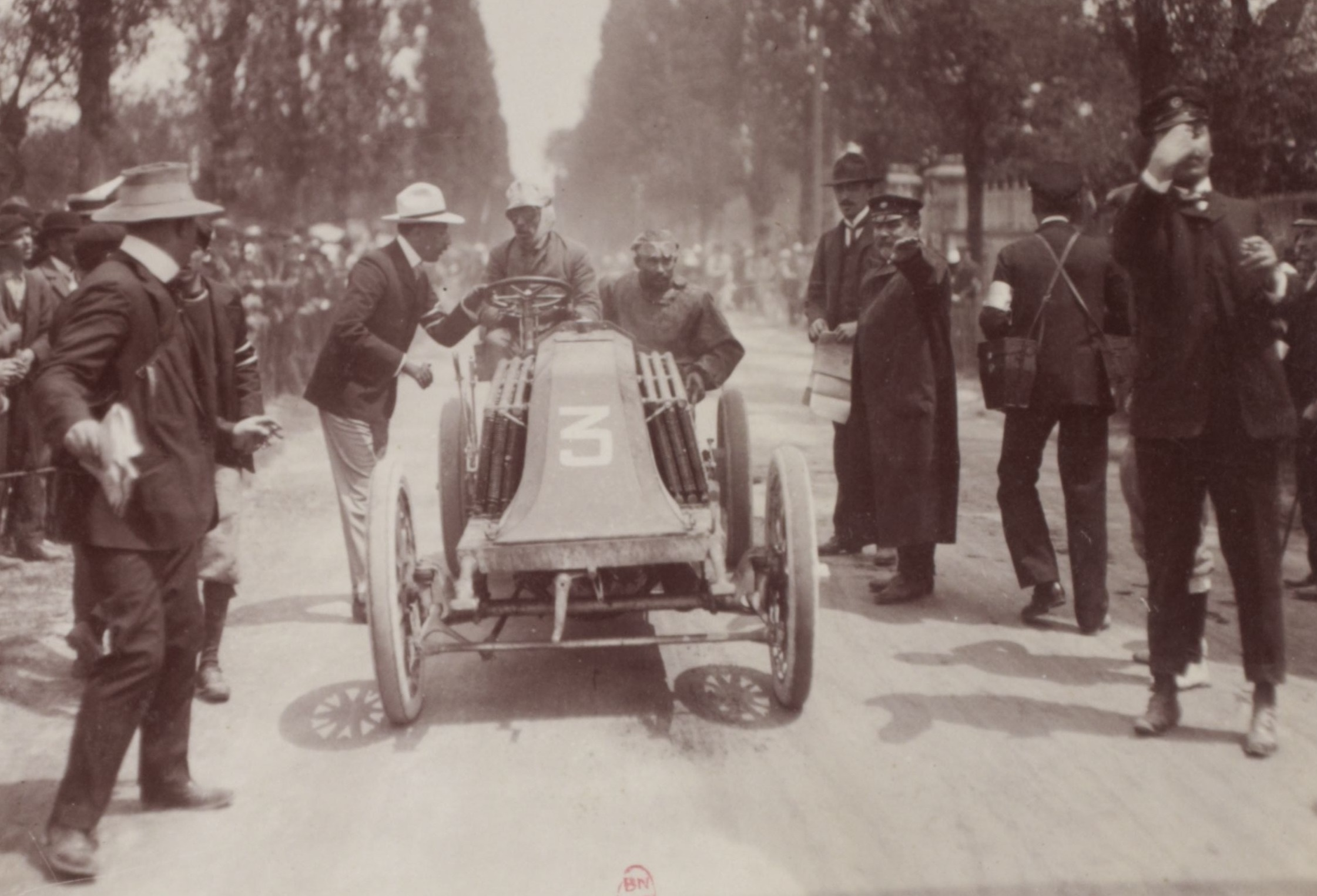 [Collection Jules Beau. Photographie sportive] : T. 21. Année 1903 / Jules Beau : F. 38. [Paris - Bordeaux]